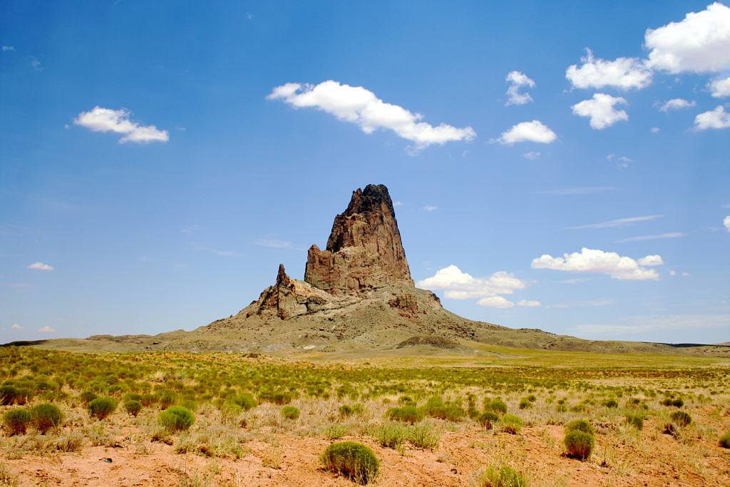 Agathla peak, Arizona